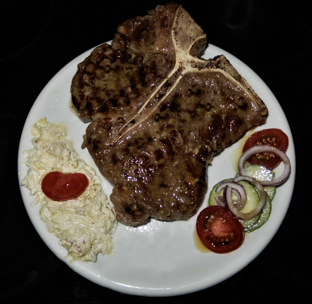 Porterhousesteak mit Beilagen